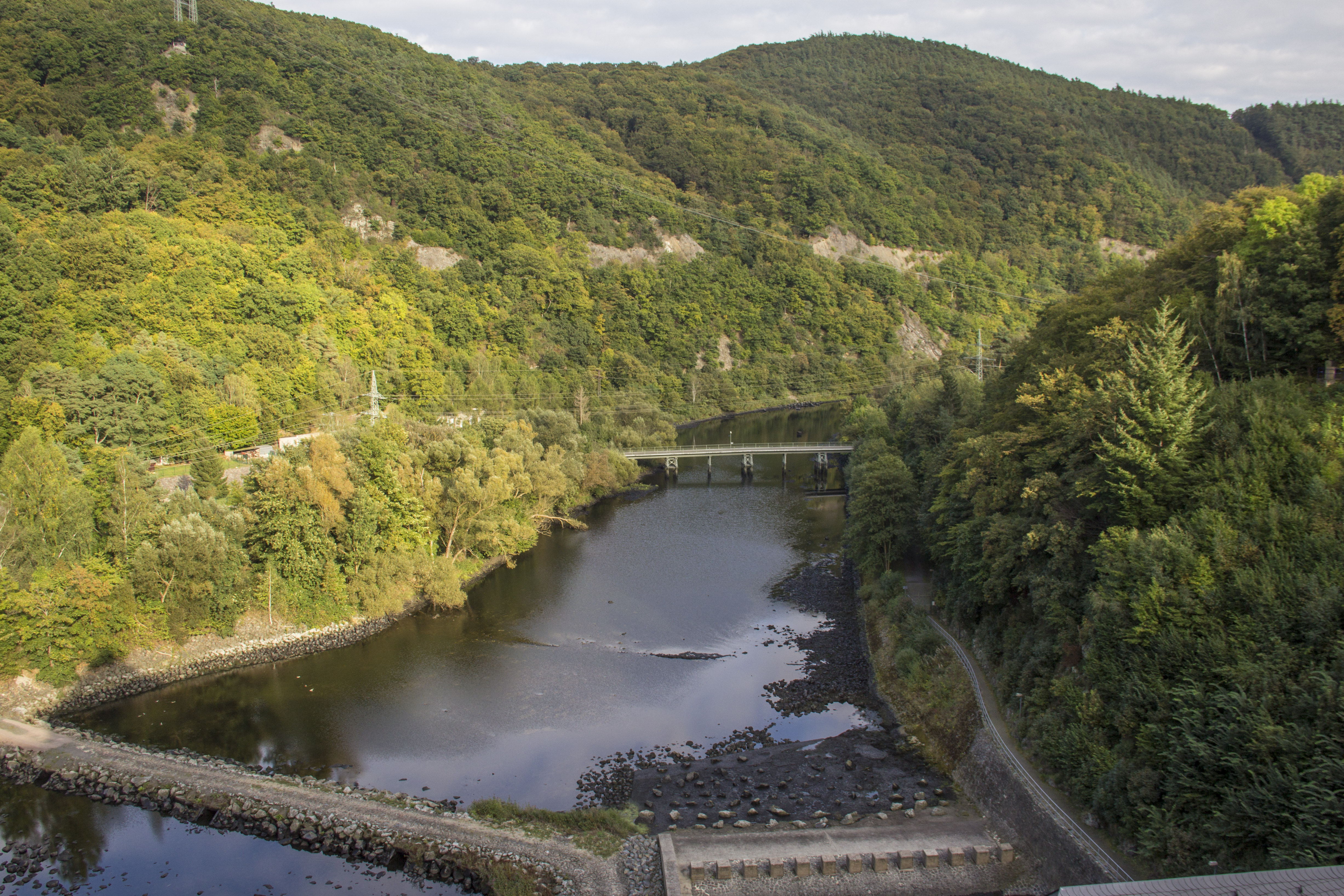 Edersee, Staudam